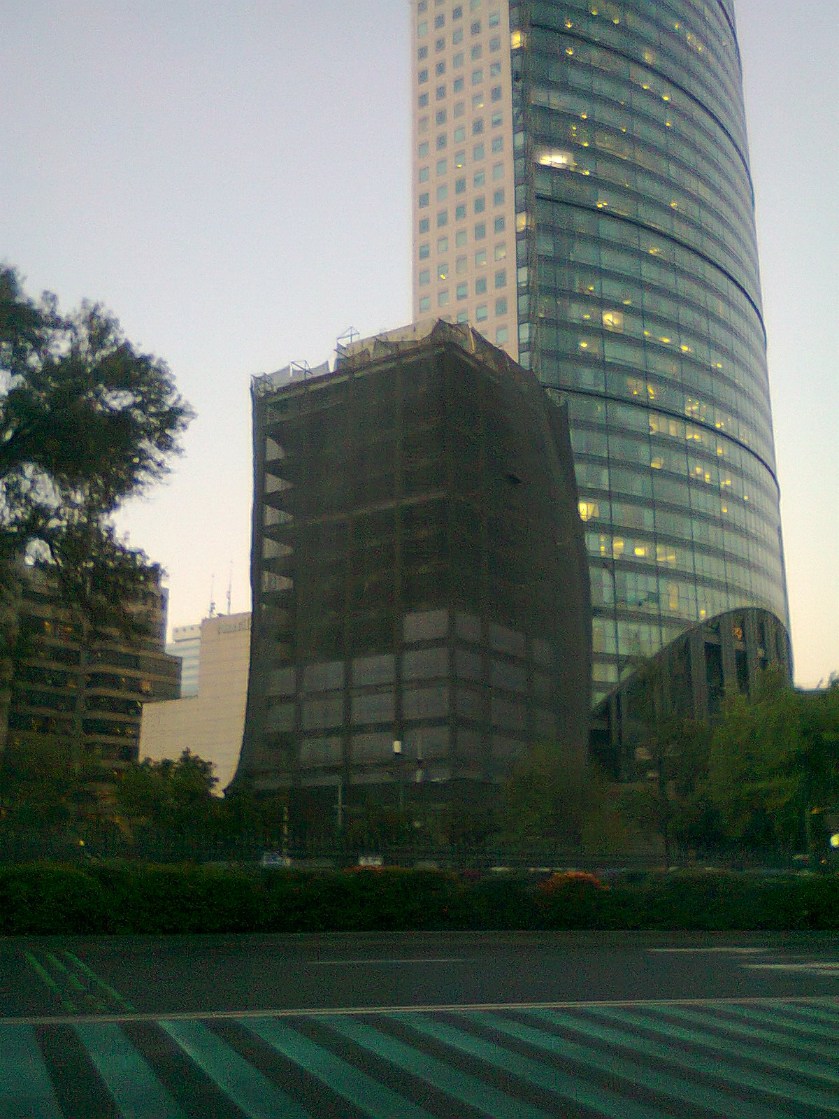 Torre Reforma 509 Demolición